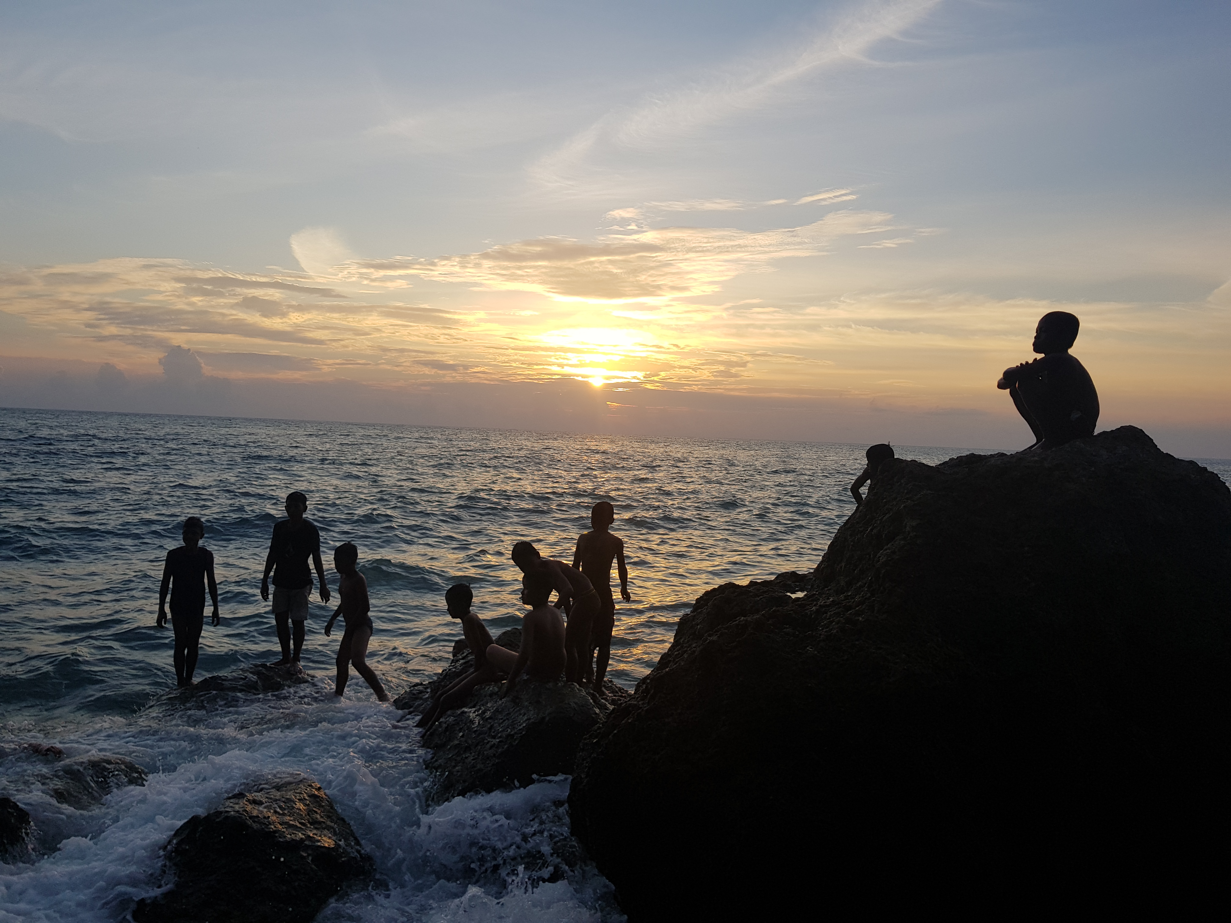 Pantai Desa Oti yang diambil oleh Arif Syamsul